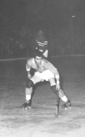 Ferruccio Panagini, campione mondiale 1953 di Hockey su pista, azione di gioco.